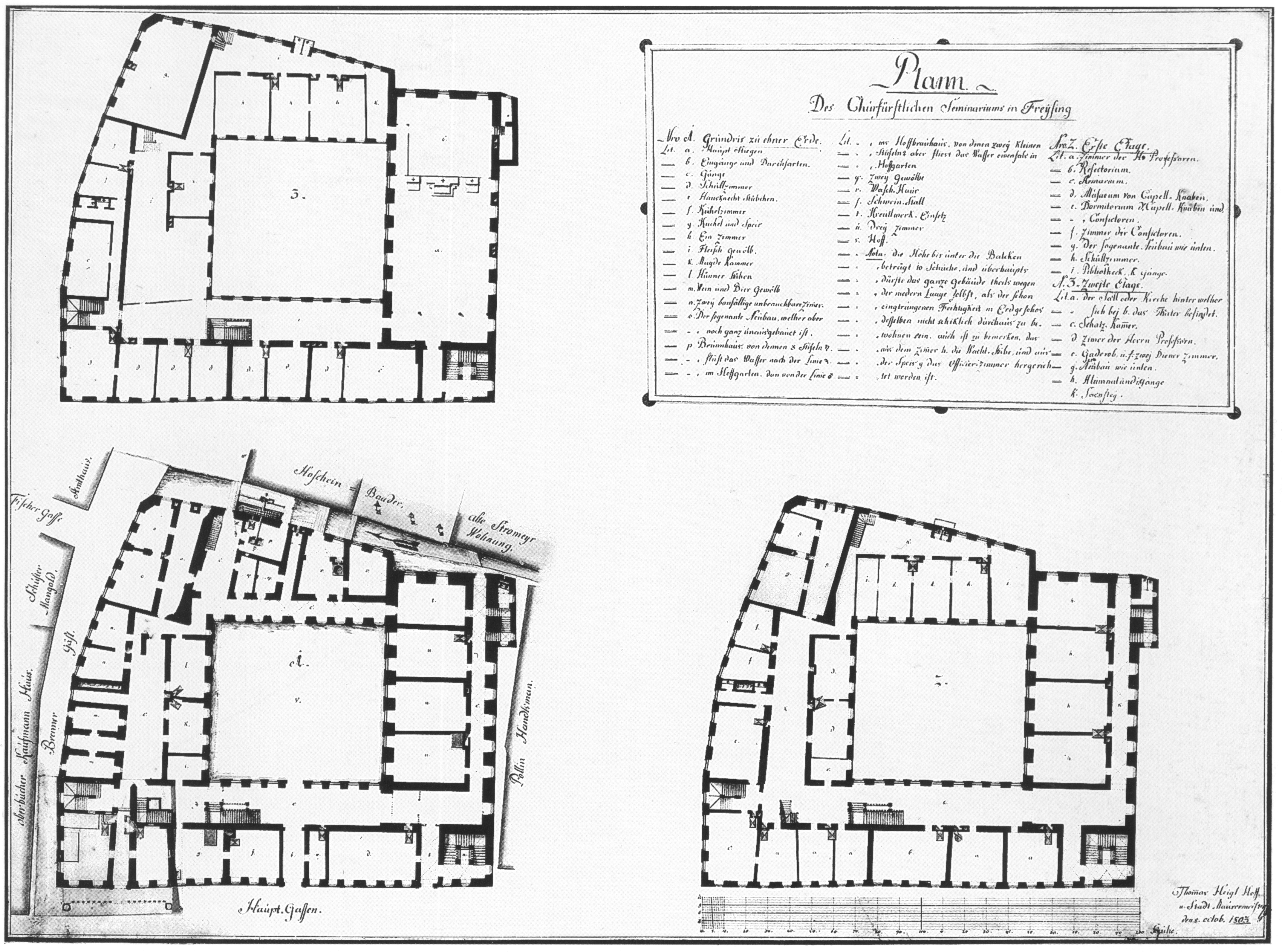 Grundriss des Lyceums in Freising